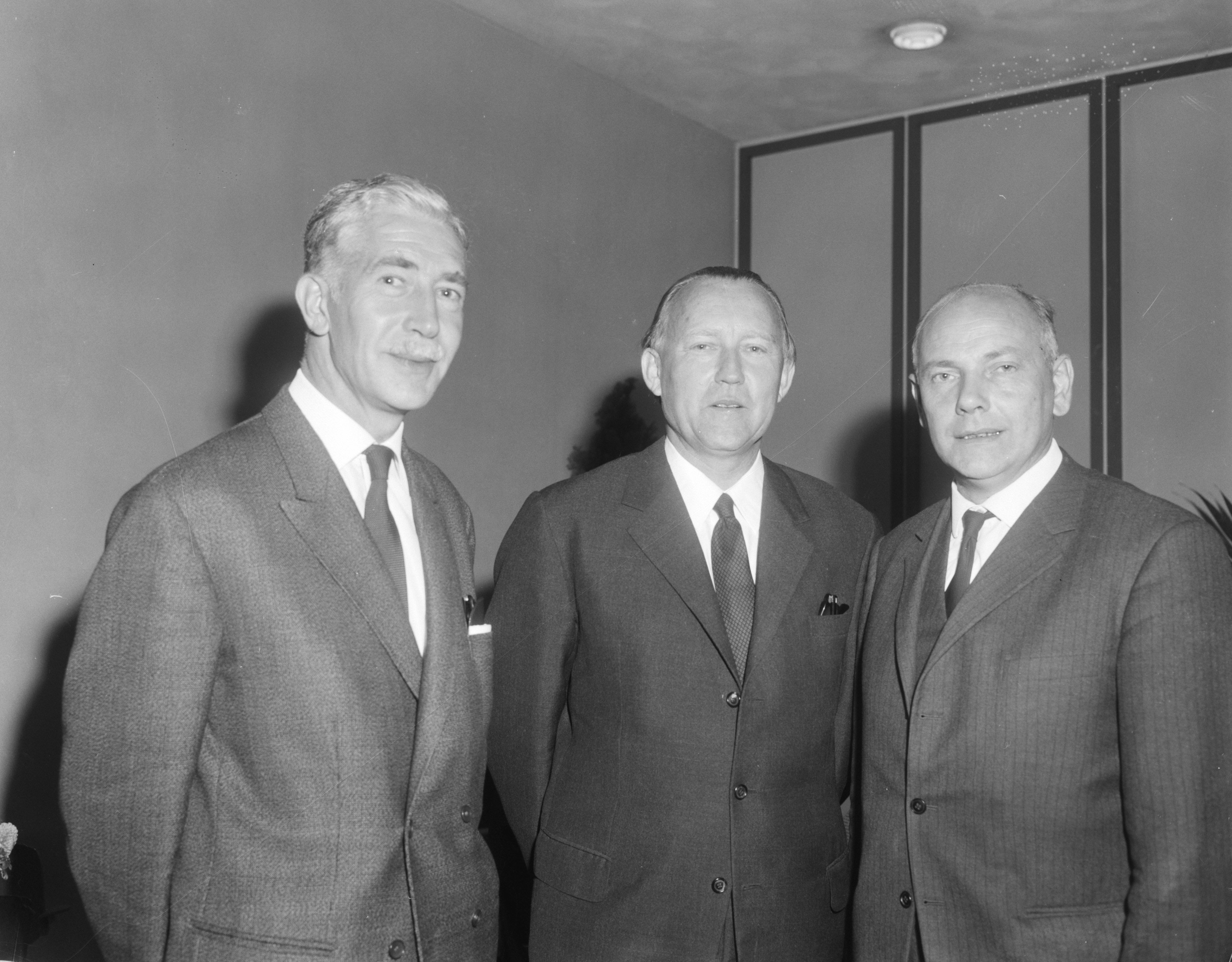 Collectie / Archief : Fotocollectie Anefo Reportage / Serie : [ onbekend ] Beschrijving : Conferentie Energie-voorziening in Europese Gemeenschap t Haarlem, v.l.n.r. drs. Z.P. Wellenstein , dr. H. van Groben en Minister Den Uyl Datum : 16 september 1965 Locatie : Haarlem Trefwoorden : conferenties Persoonsnaam : Dr. H. van Groben, Drs. Z.P. Wellenst, Uyl, Joop den Fotograaf : Bilsen, Joop van / Anefo Auteursrechthebbende : Nationaal Archief Materiaalsoort : Negatief (zwart/wit) Nummer archiefinventaris : bekijk toegang 2.24.01.04 Bestanddeelnummer : 918-1873